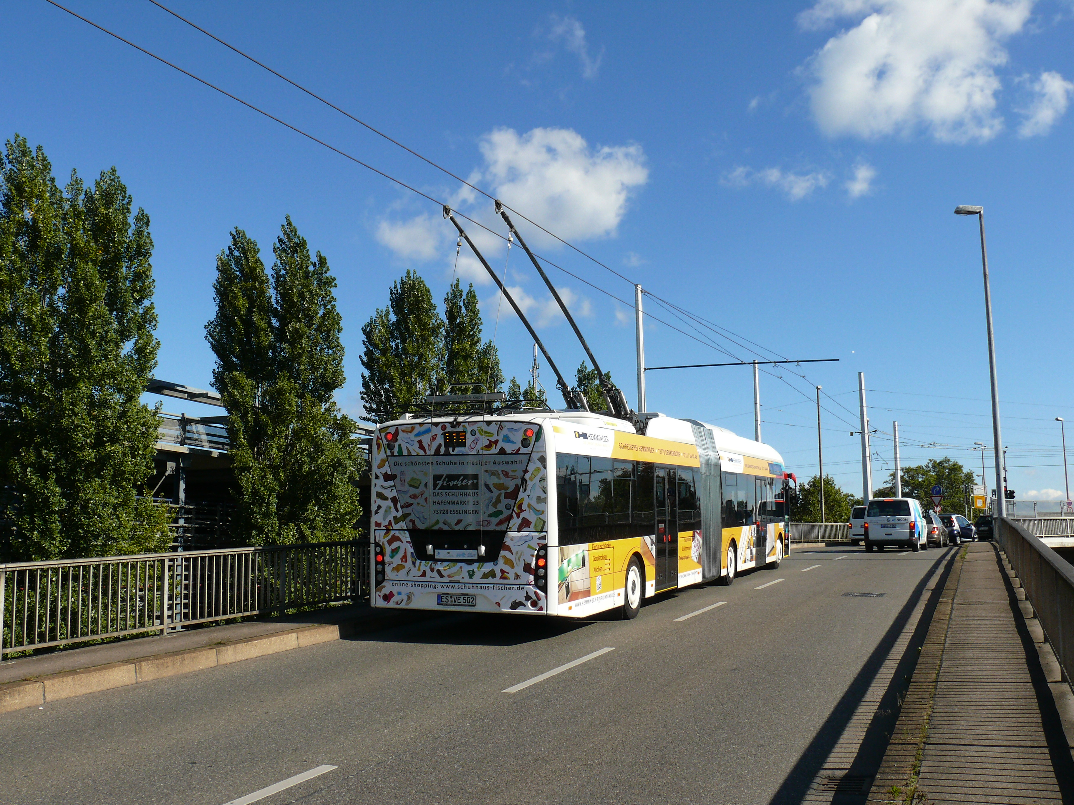 Ein Oberleitungsbus vom Typ Trollino "18,75 MetroStyle" des polnischen Herstellers Solaris in Esslingen am Neckar. Heckansicht.